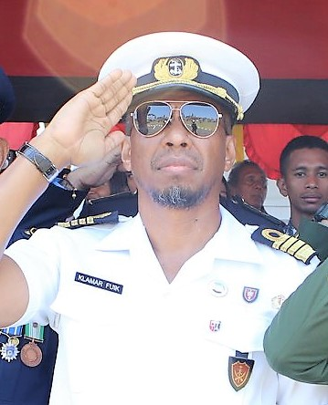 Pedro Klamar Fuik bei den Feierlichkeiten zum Proklamationstag 2019